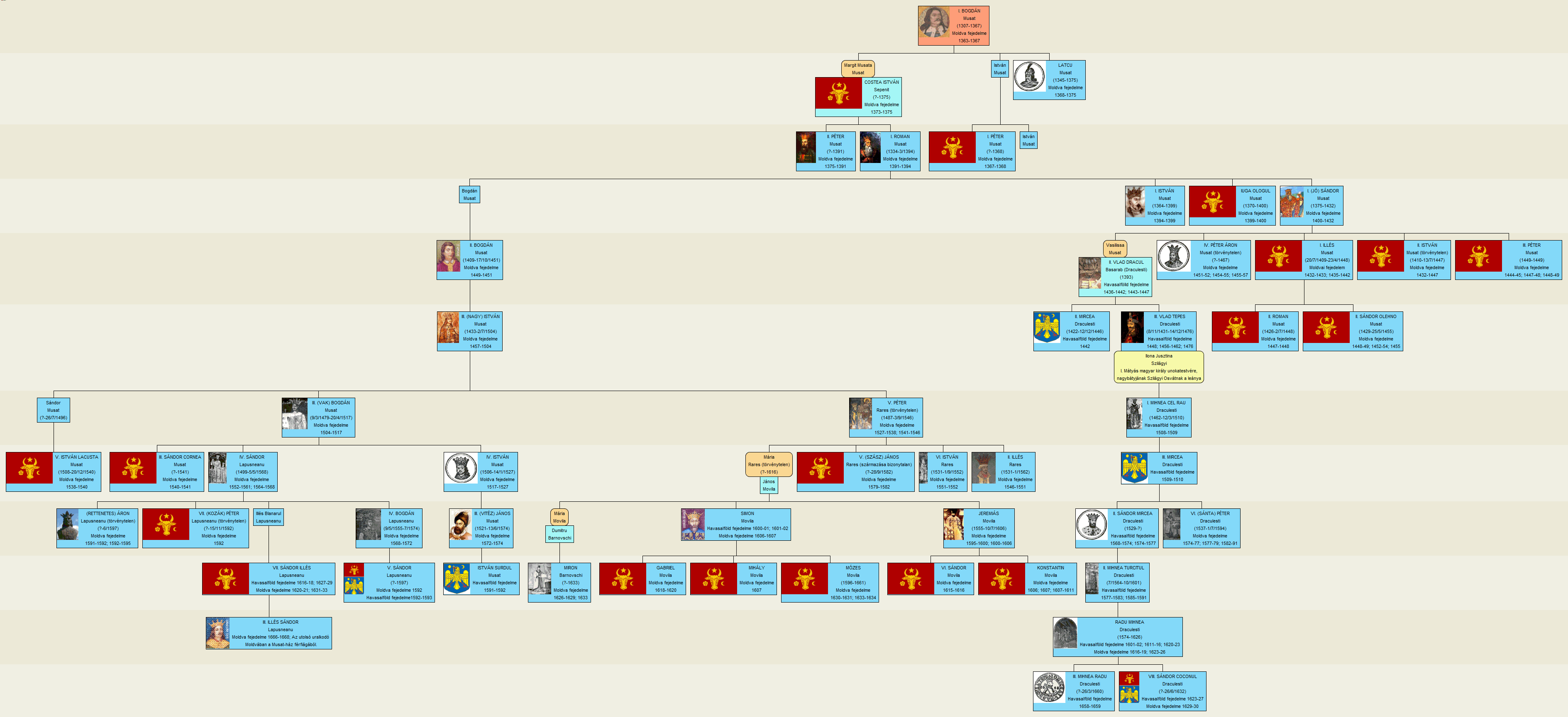 A Bogdán-Musat ház